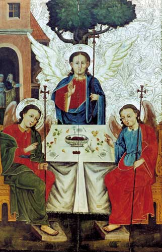 Тройца. ХVІІ ст. З в. Дастоева Іванаўскага раёна. Музей старажытнабеларускай культуры НАН Беларусі